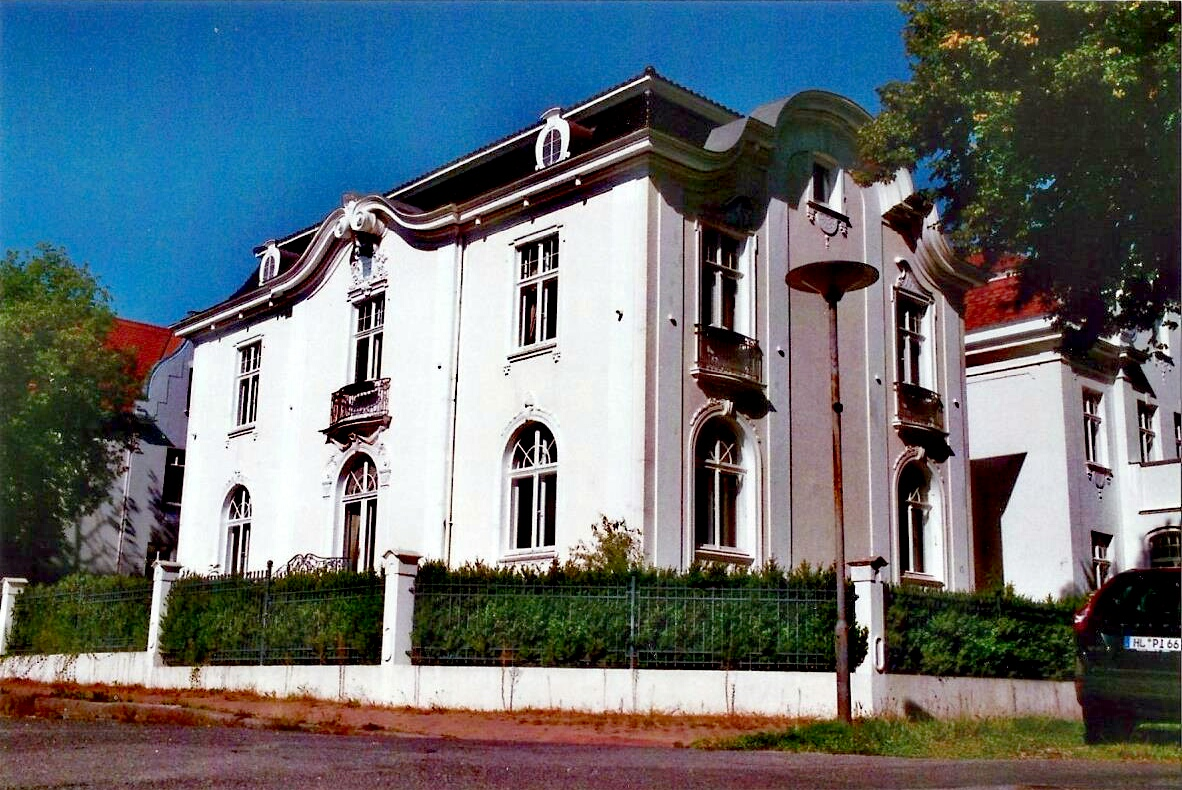 Ansicht des Gebäudes